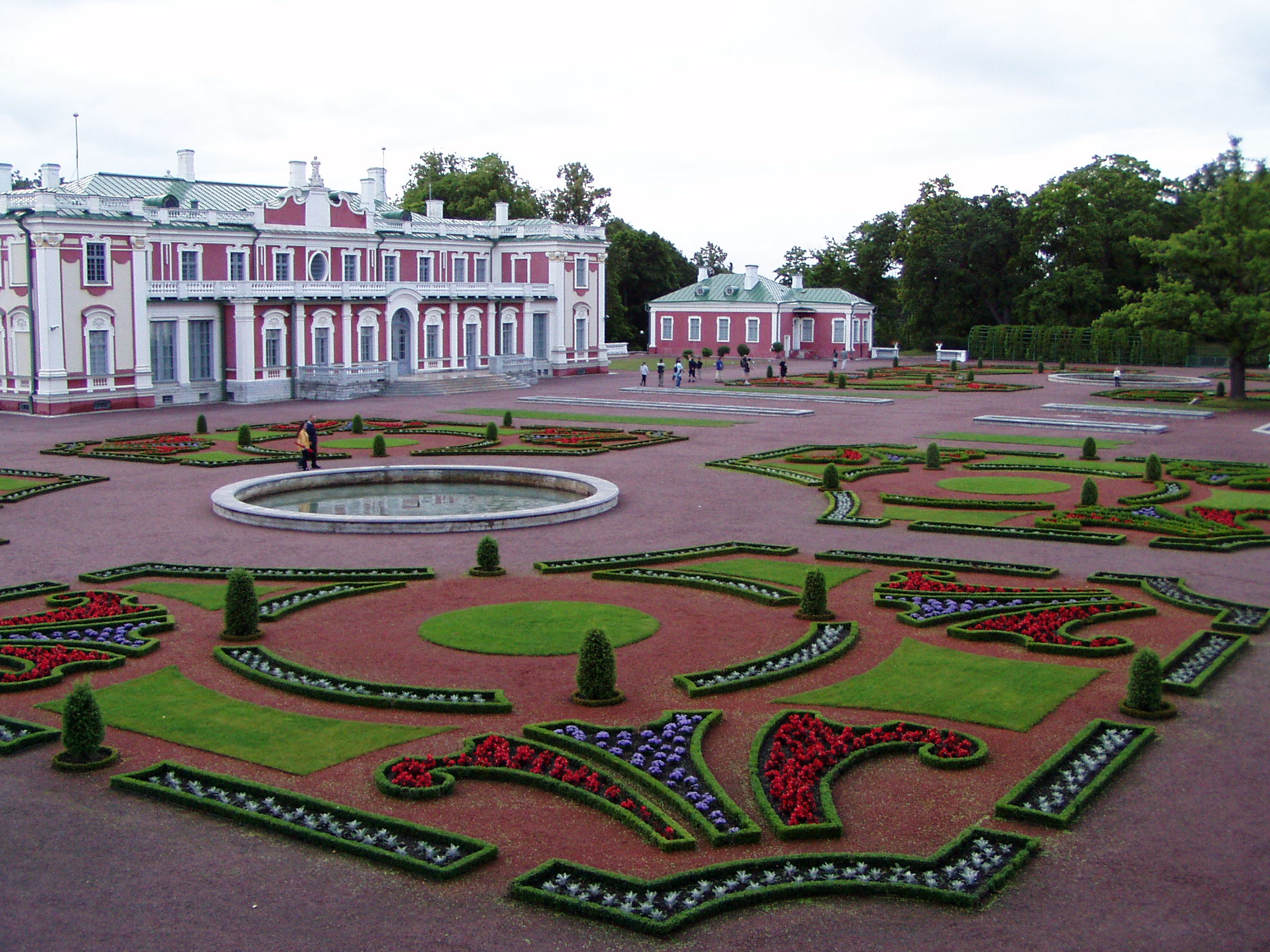 Park za pałacem Kadrioru